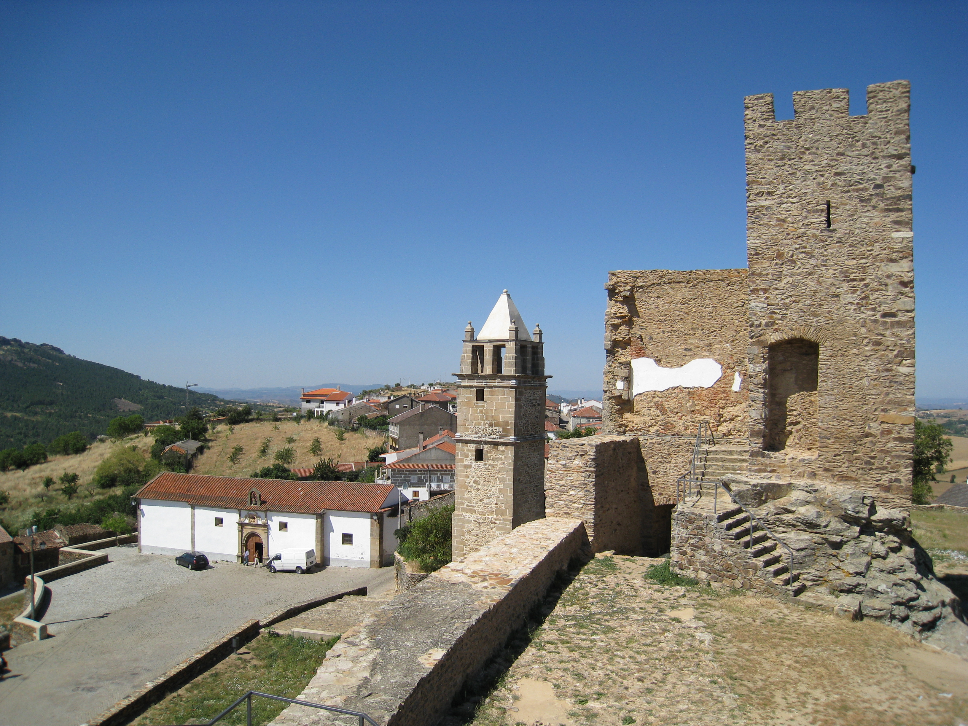 Mogadouro_2